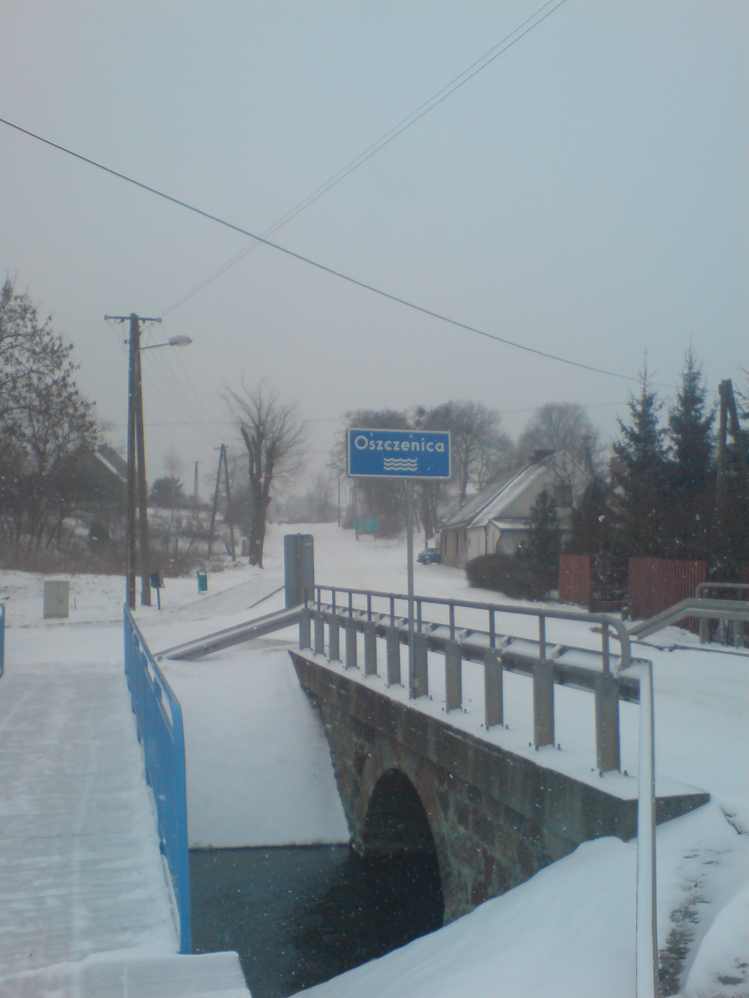 Oszczynica w Chrzypsku Wielkim - most na drodze wojewódzkiej nr 133